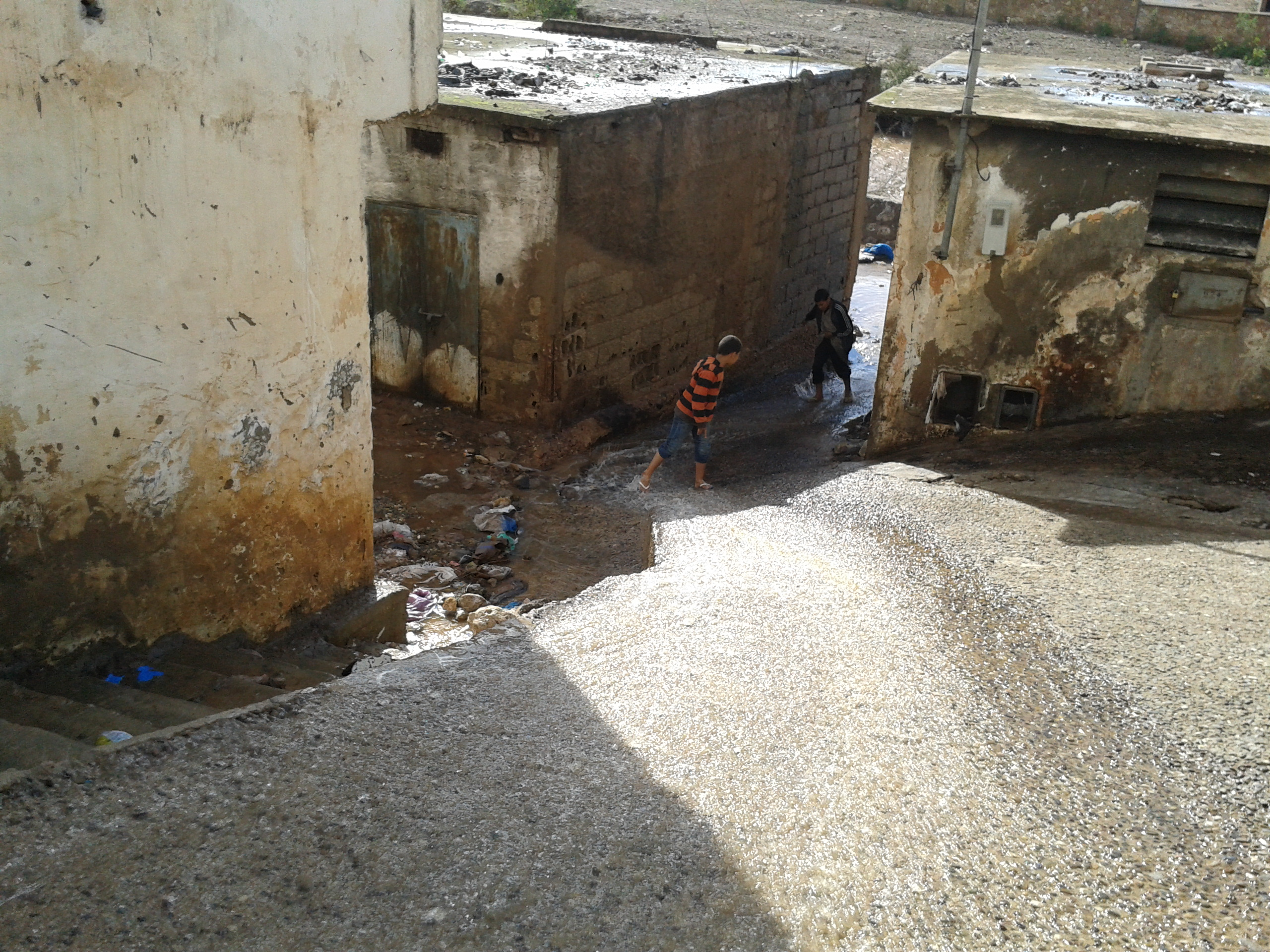 اطفال يلعبون في احدى مجاري المياه